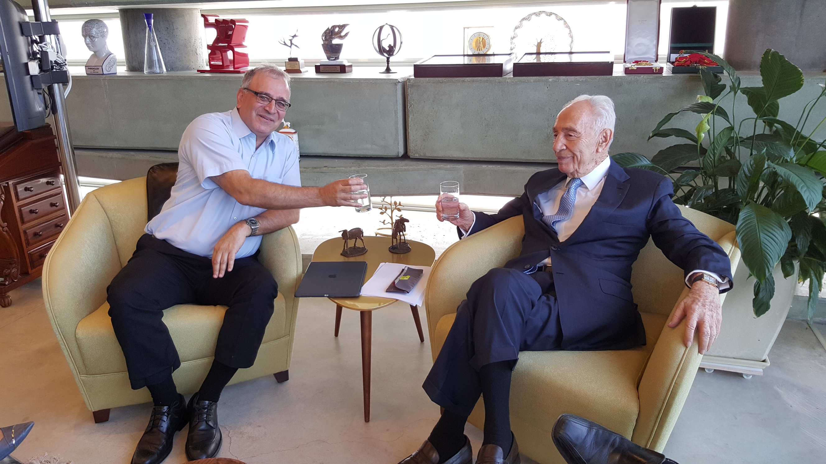 בוקי אורן Booky Oren